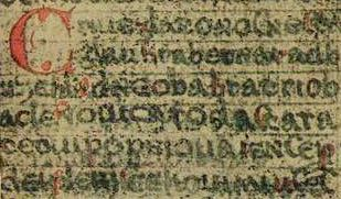 Rukopis zelenohorský, strana 2, detail. Iniciála „C“ značí K uprostřed 12. verše: […na Otavě] krivě, zlatonosně/Sta glav chraber na Radb uzě chladně/Oba bratry, ob a Klenovica roda stara Tetvy Popelova/jenže p [ri]de s pleky s Čechovými/v siež [e žírné vlasti prěs tri rěky…]